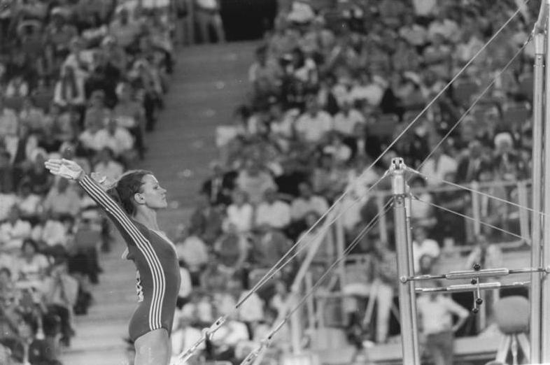 ADN-ZB-Olympiadienst-Kohls-28.8.1972-sche-München: XX. Olympische Sommerspiele. Die 20jährige Medizinstudentin Karin Janz zeigte am 27.8.1972 in der Münchner Sporthalle eine hervorragende Stufenbarrenpflicht und wurde dafür mit der Tageshöchstnote 9,85 belohnt. Das DDR-Frauen-Turnen wird durch sie seit nunmehr fünf Jahren wesentlich mitbestimmt. Sie ist zum Vorbild für den turnerischen Nachwuchs geworden. Ihre liebsten Ausgleichssportarten: Radfahren, Skilaufen und Schwimmen. - Erstrecht